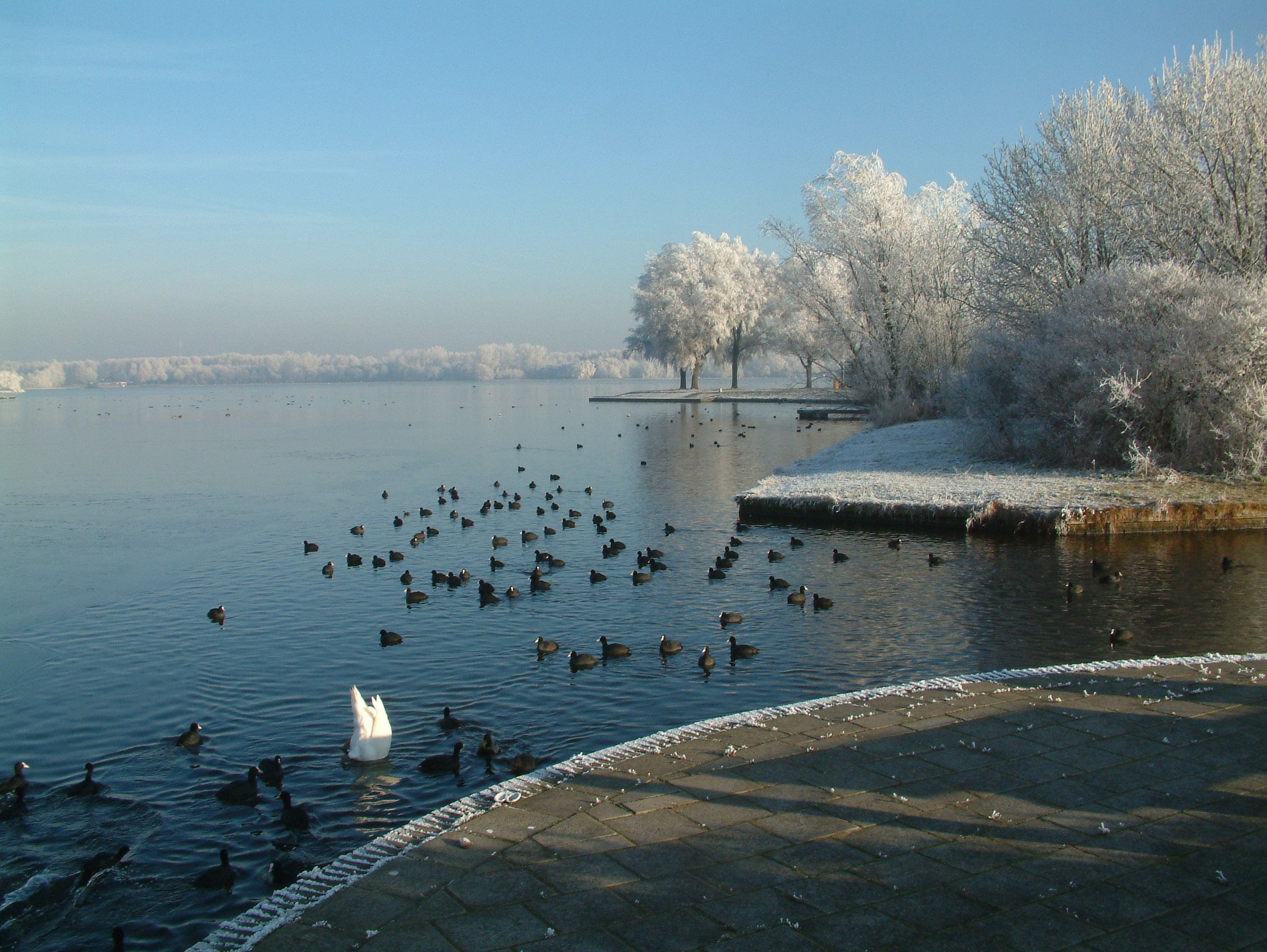 Zoetermeerse Plas in de winter